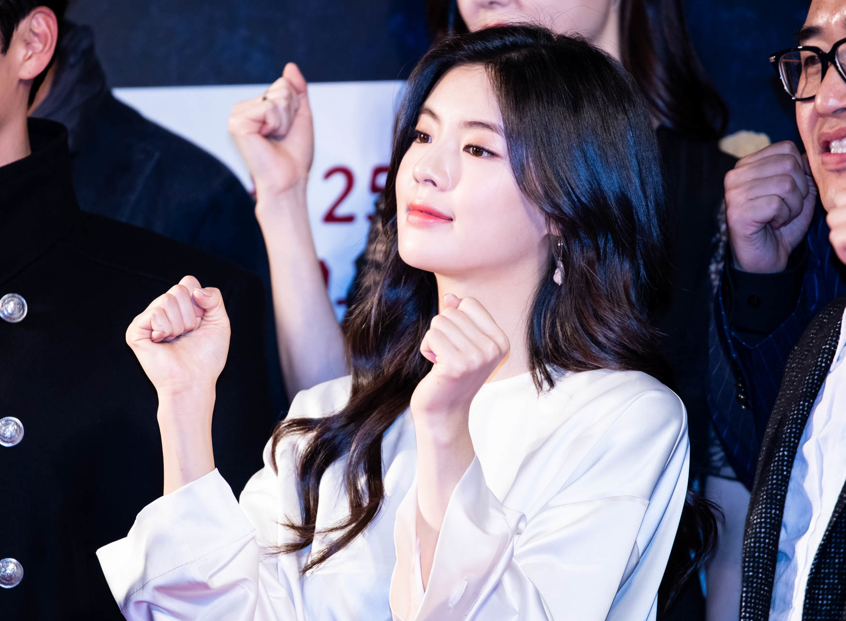 181018 창궐 VIP시사회 셀러브리티